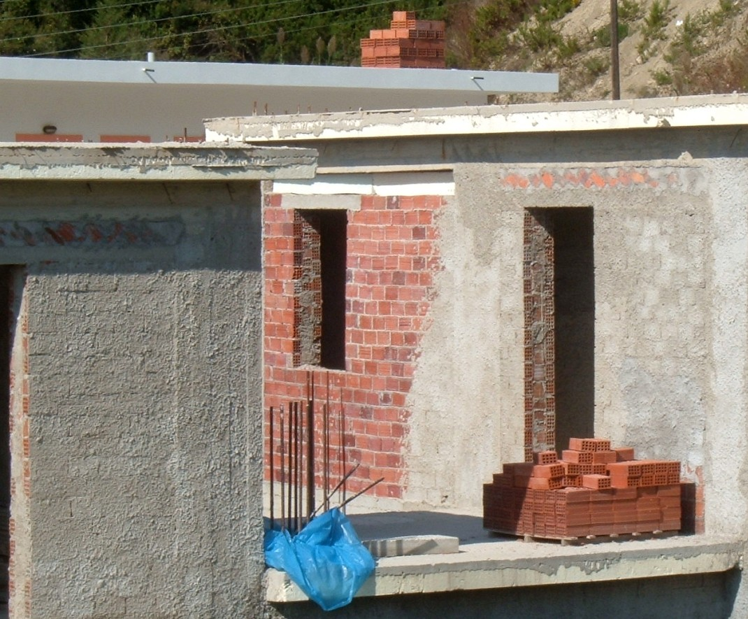 Langlochziegelwand zwischen Betonständern.